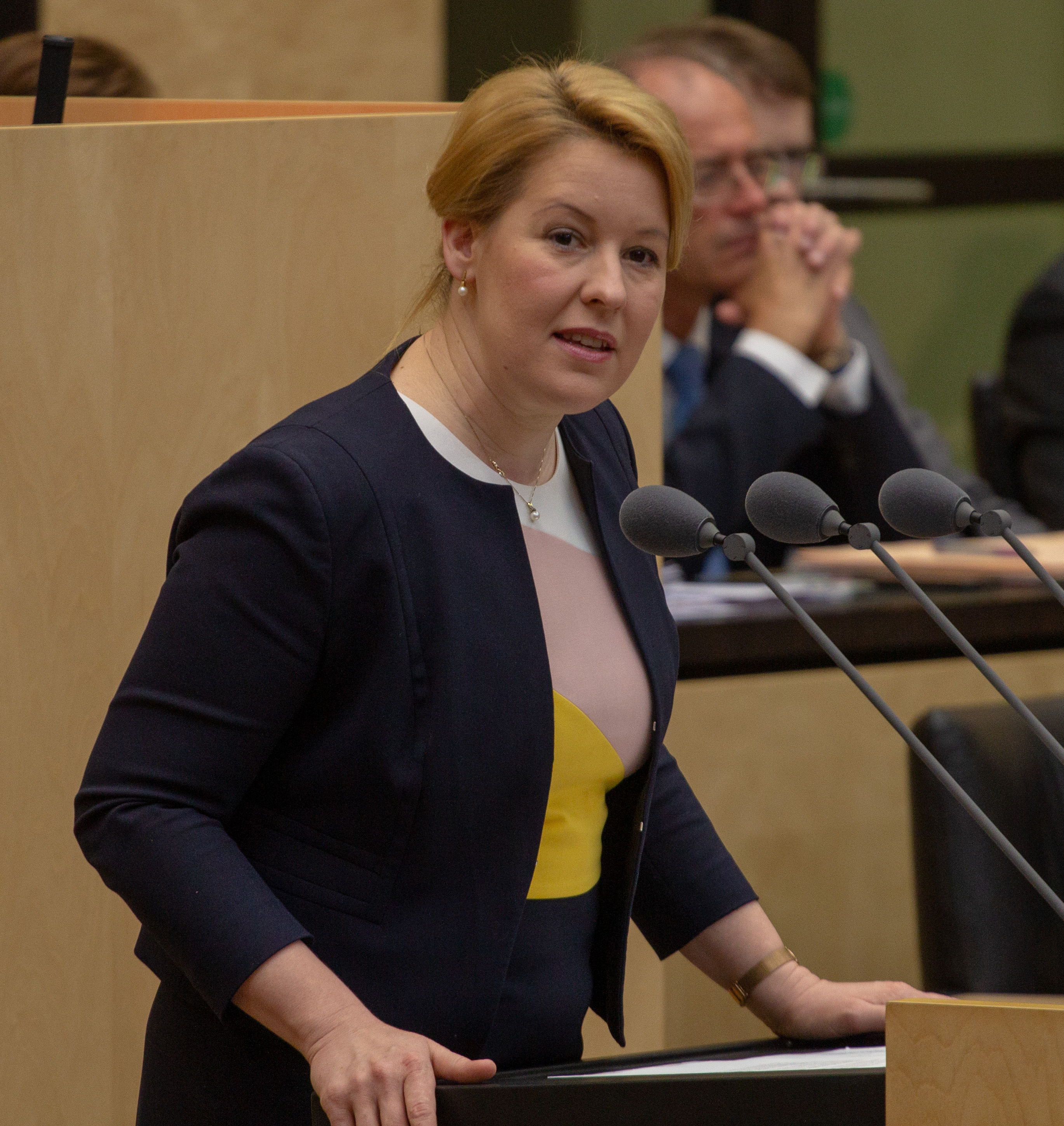 Plenarsitzung des Bundesrates am 12. April 2019 in Berlin.